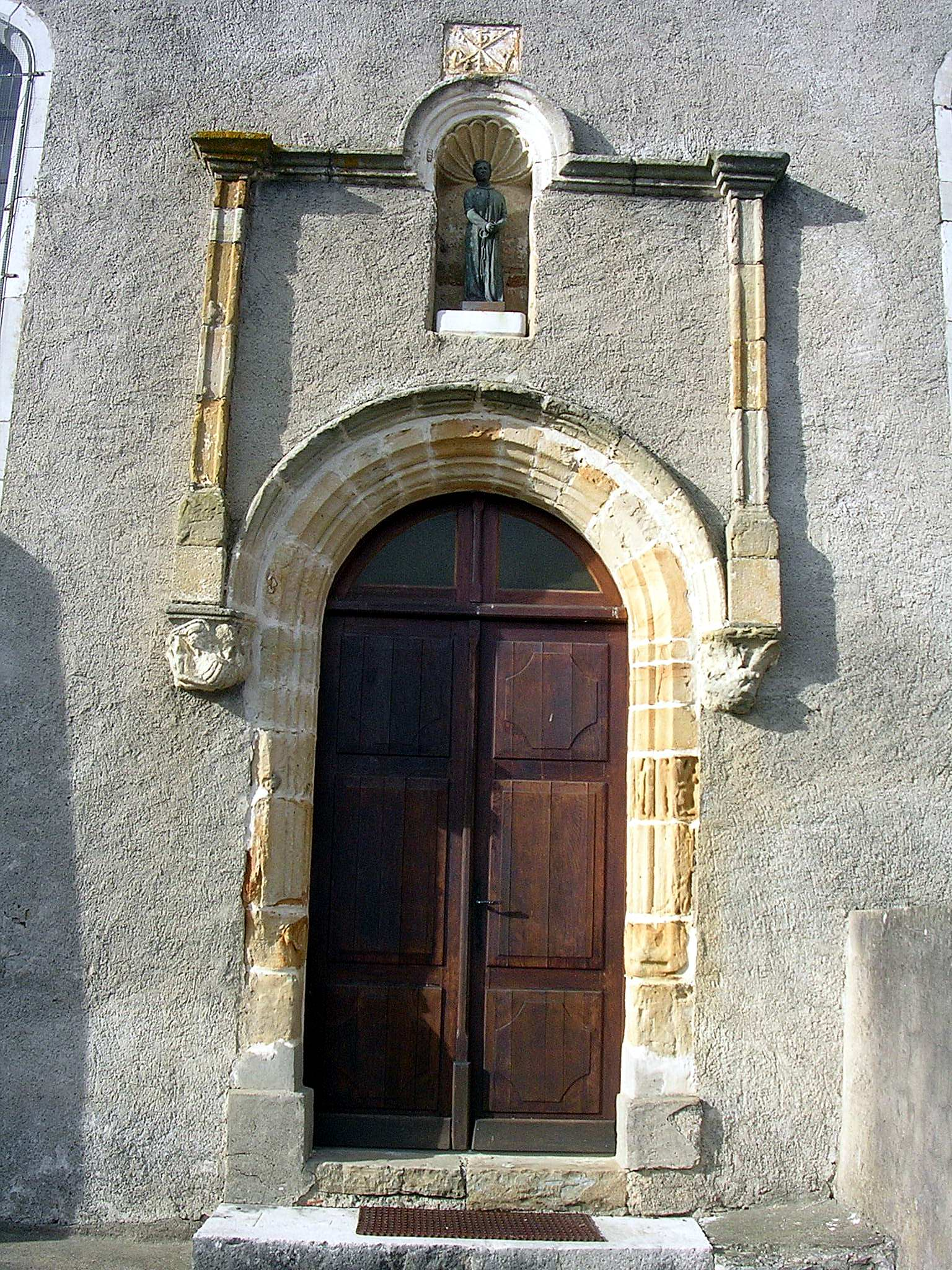 Eglise Athos-Aspis